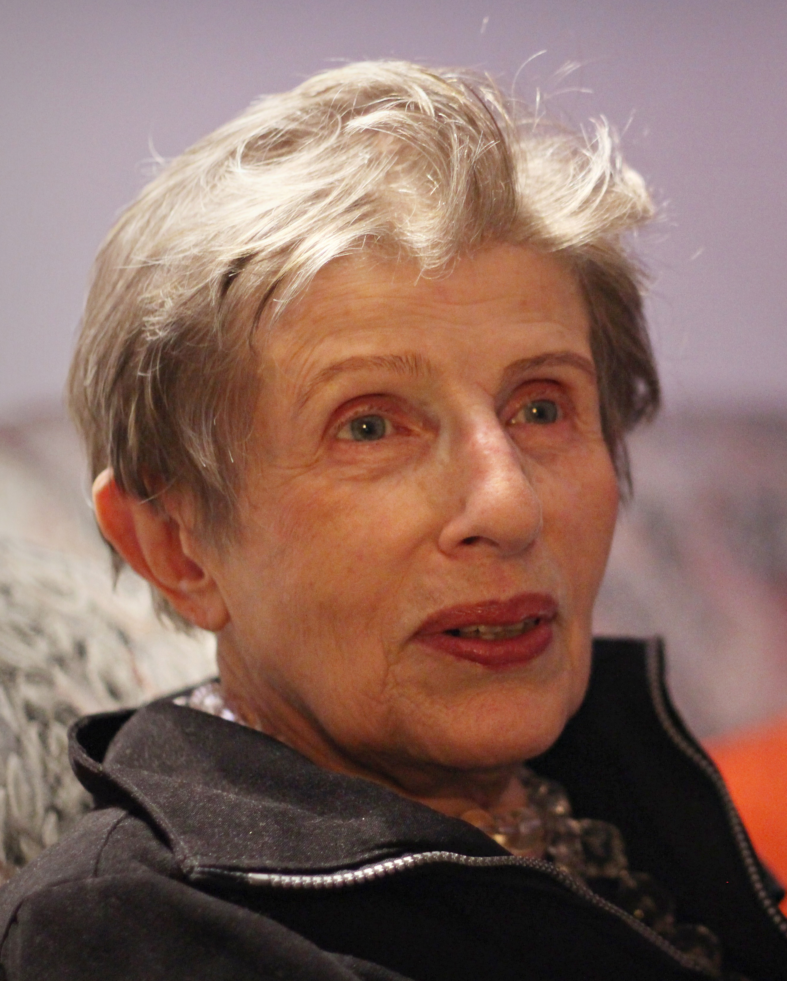 Anna Jekiełek, polska scenograf i kostiumograf.